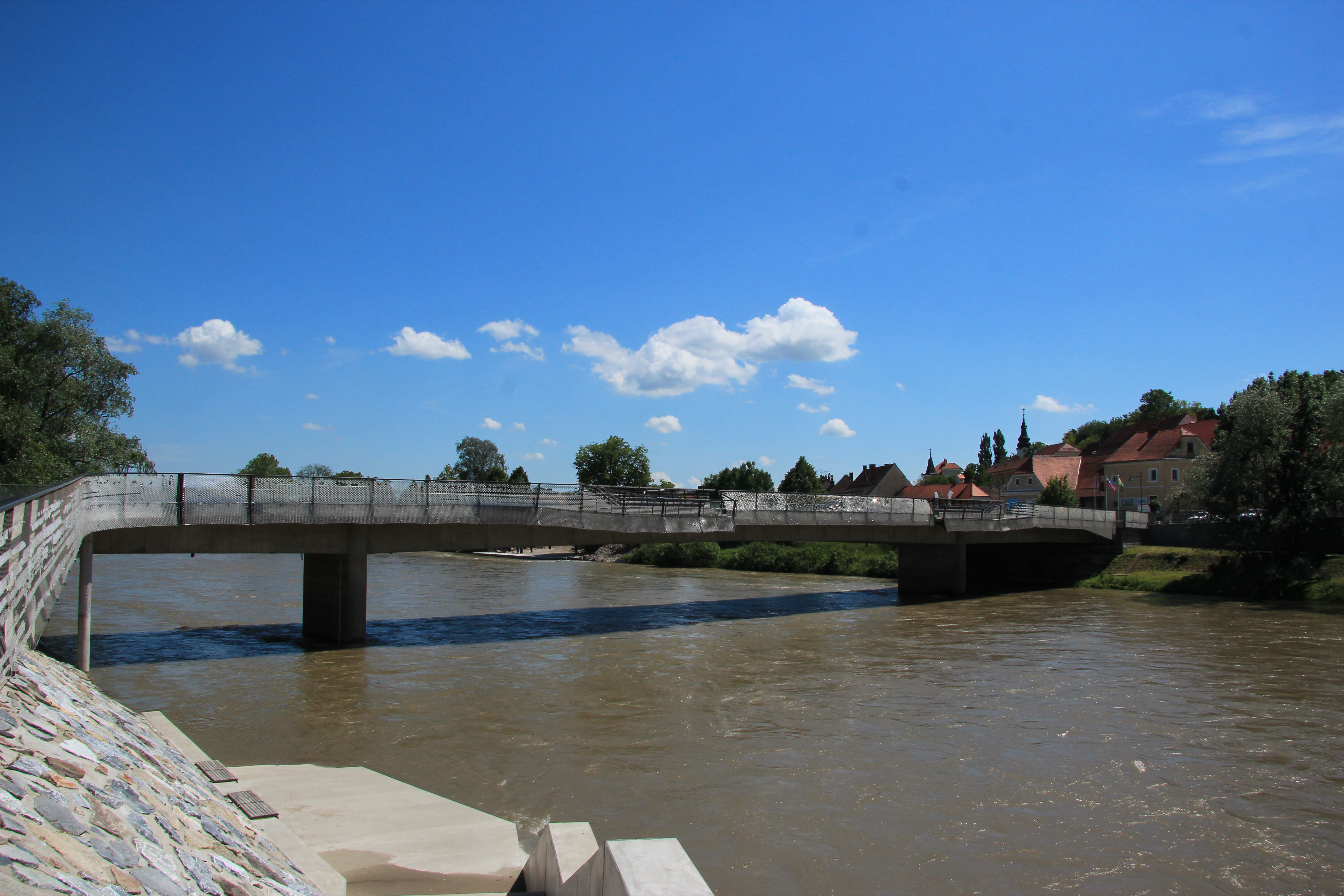 Murgrenzbrücke zwidschen Bad Radkersburg und Gornja Radgona